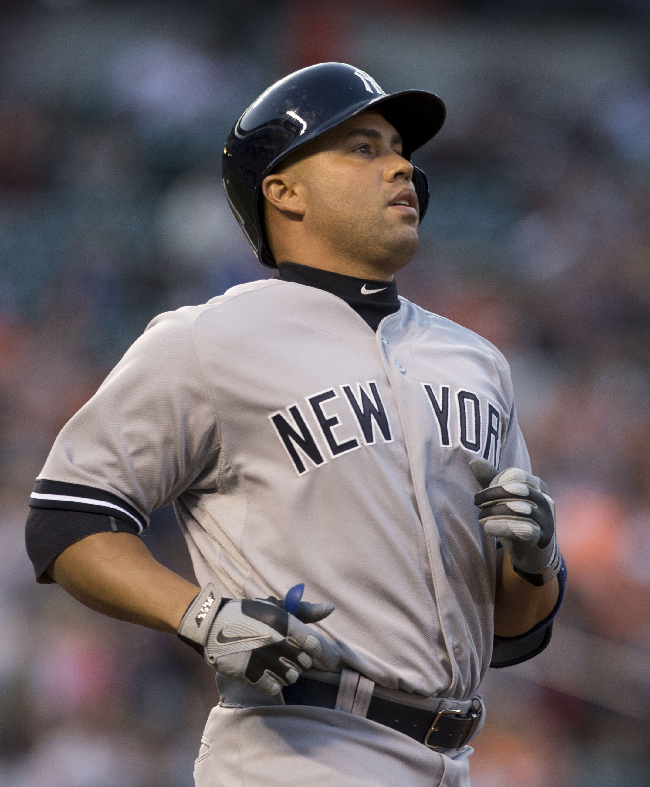 Yankees at Orioles 04/13/15